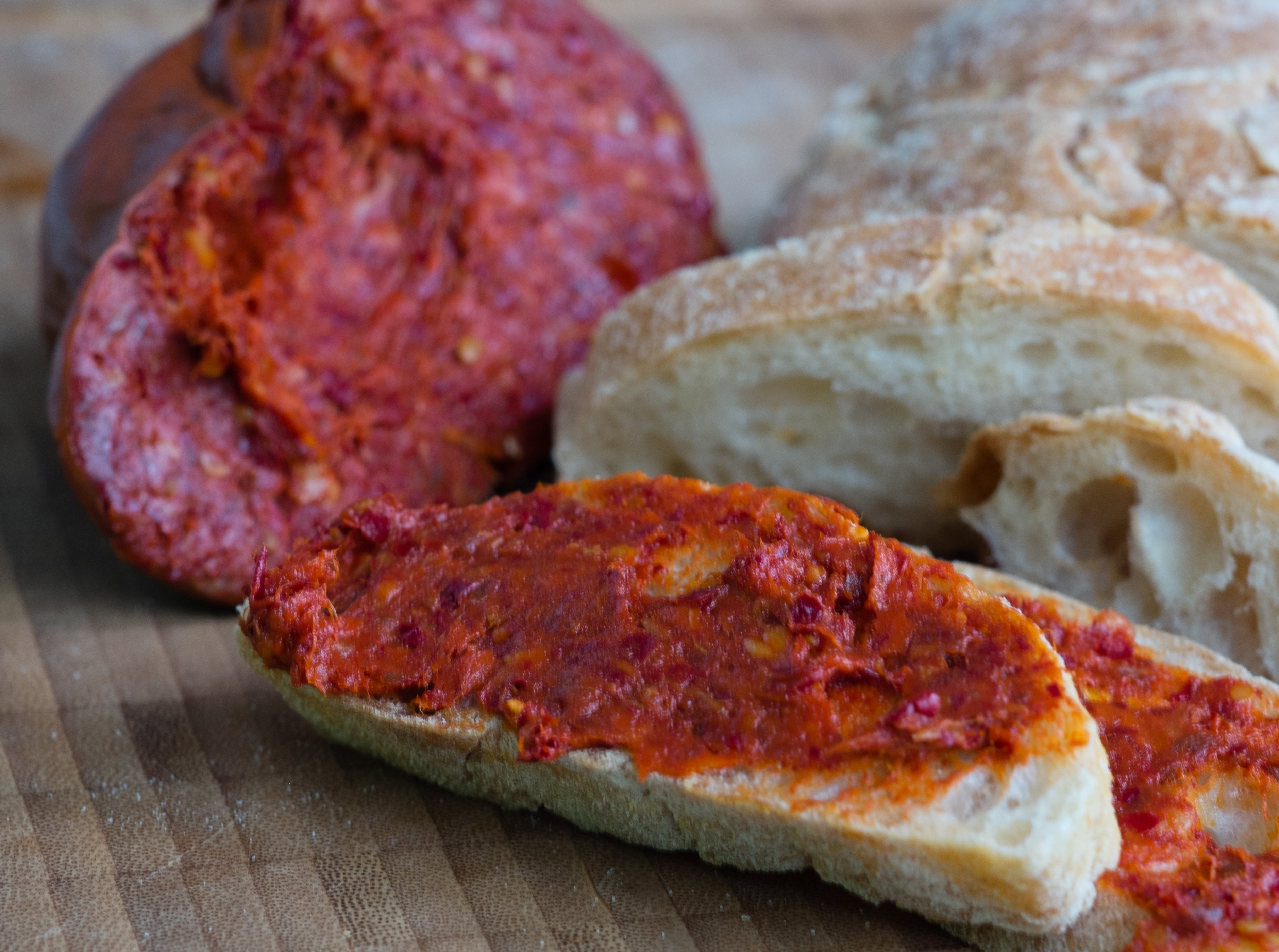 Salami-Spezialität aus Kalabrien, sehr scharf